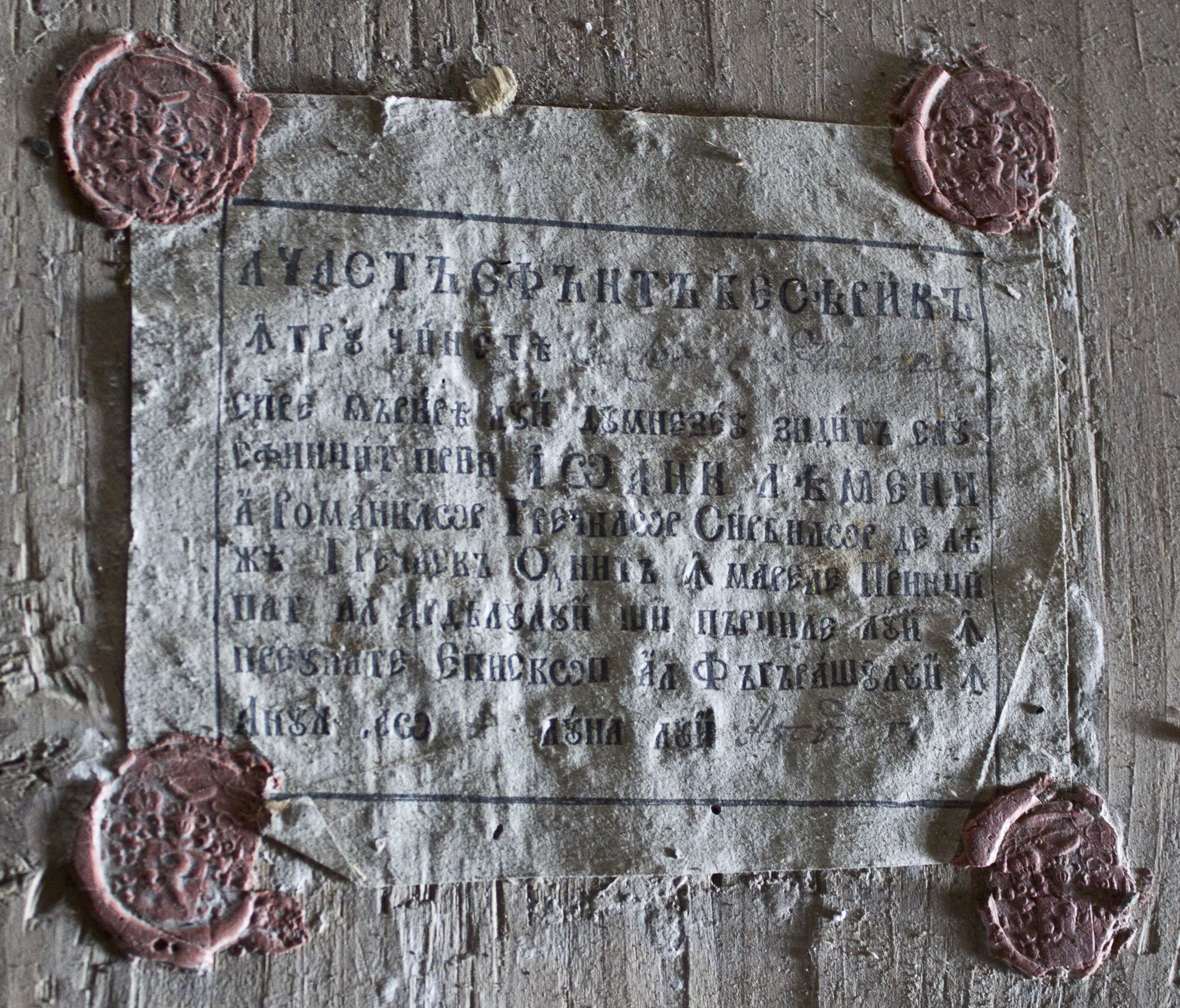 Biserica de lemn din Fodora, judeţul Sălaj.